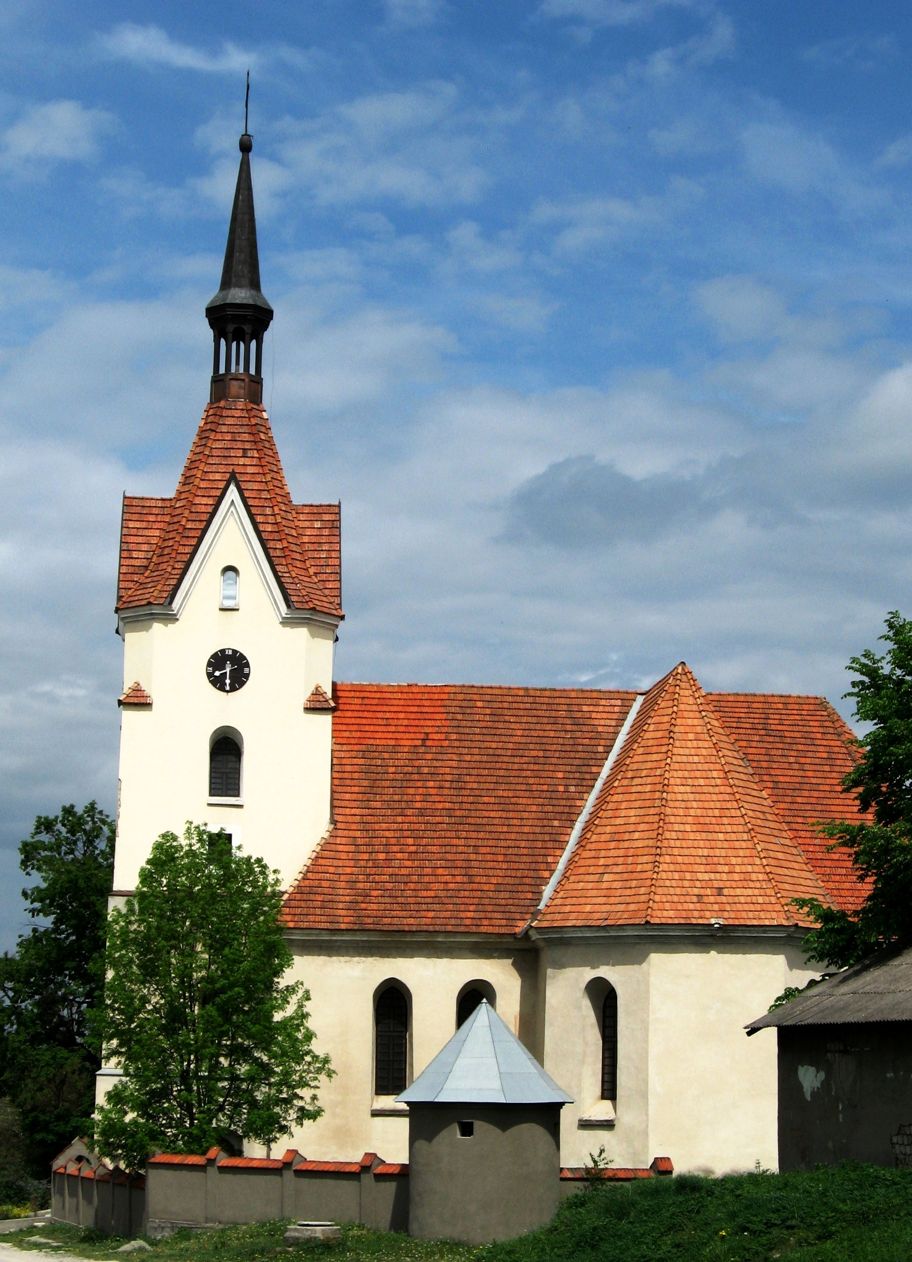 Костел Внебовзяття Пресвятої Діви Марії (мур.), Скала-Подільська, вул.Грушевського